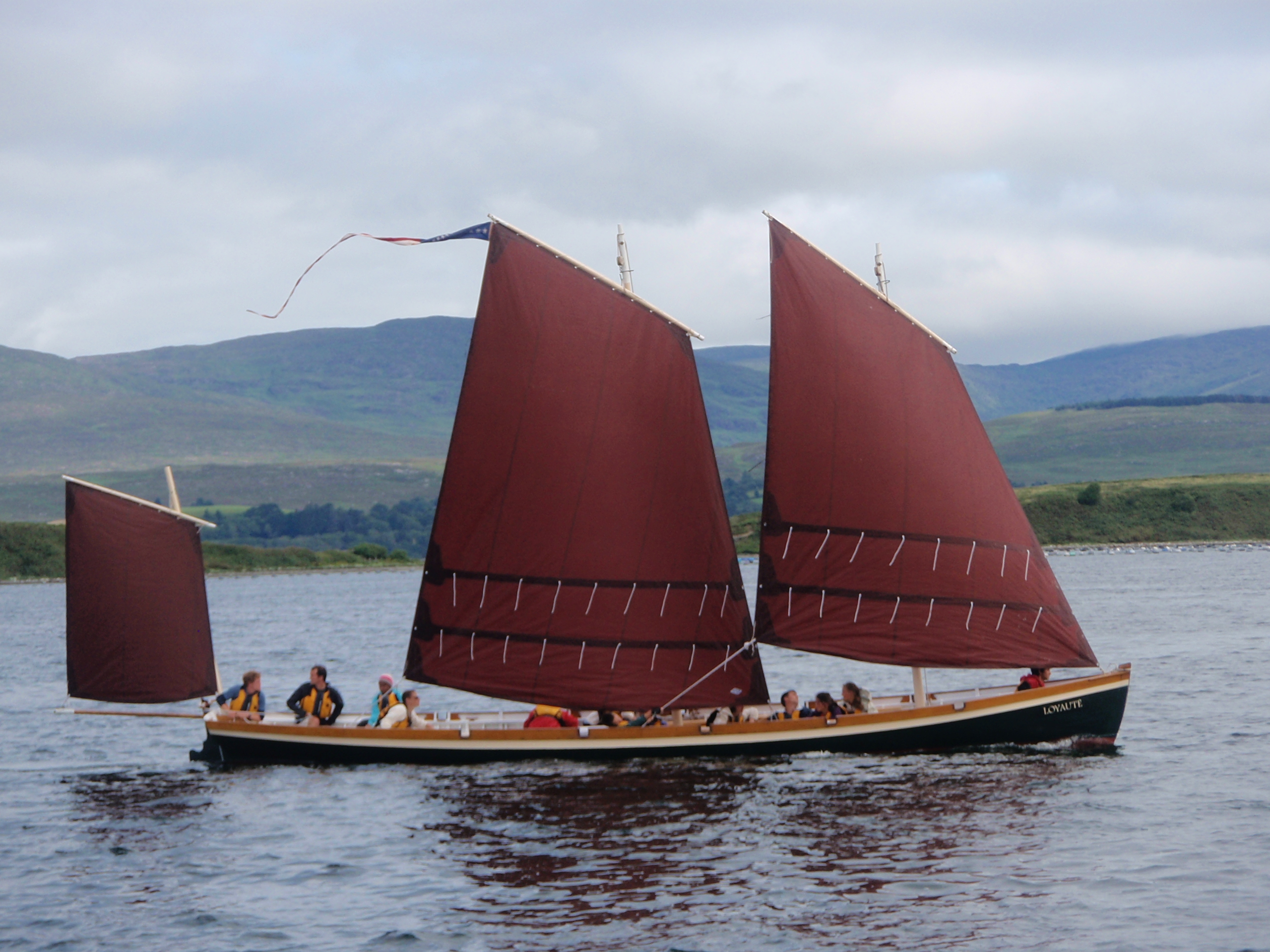 "Loyauté", Iole degli Stati Uniti d'America